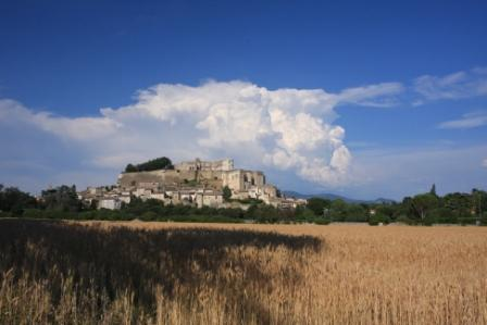 GRIGNAN en juin 2014 (photo G. Poignant)